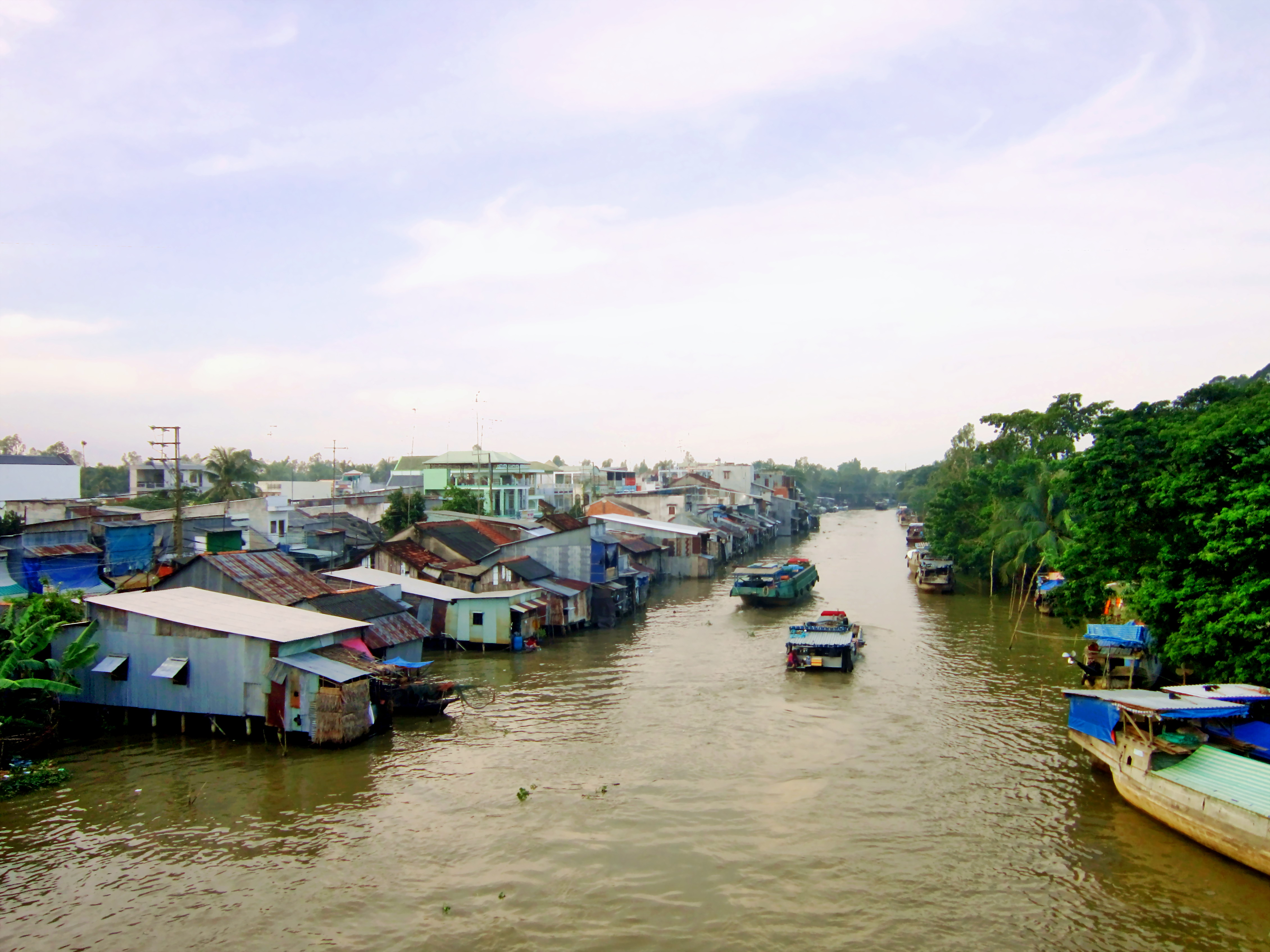 Chợ Bình Hòa (trái ảnh) bên kênh Mặc Cần Dưng ở xã Bình Hòa, huyện Châu Thành, tỉnh An Giang, Việt Nam.